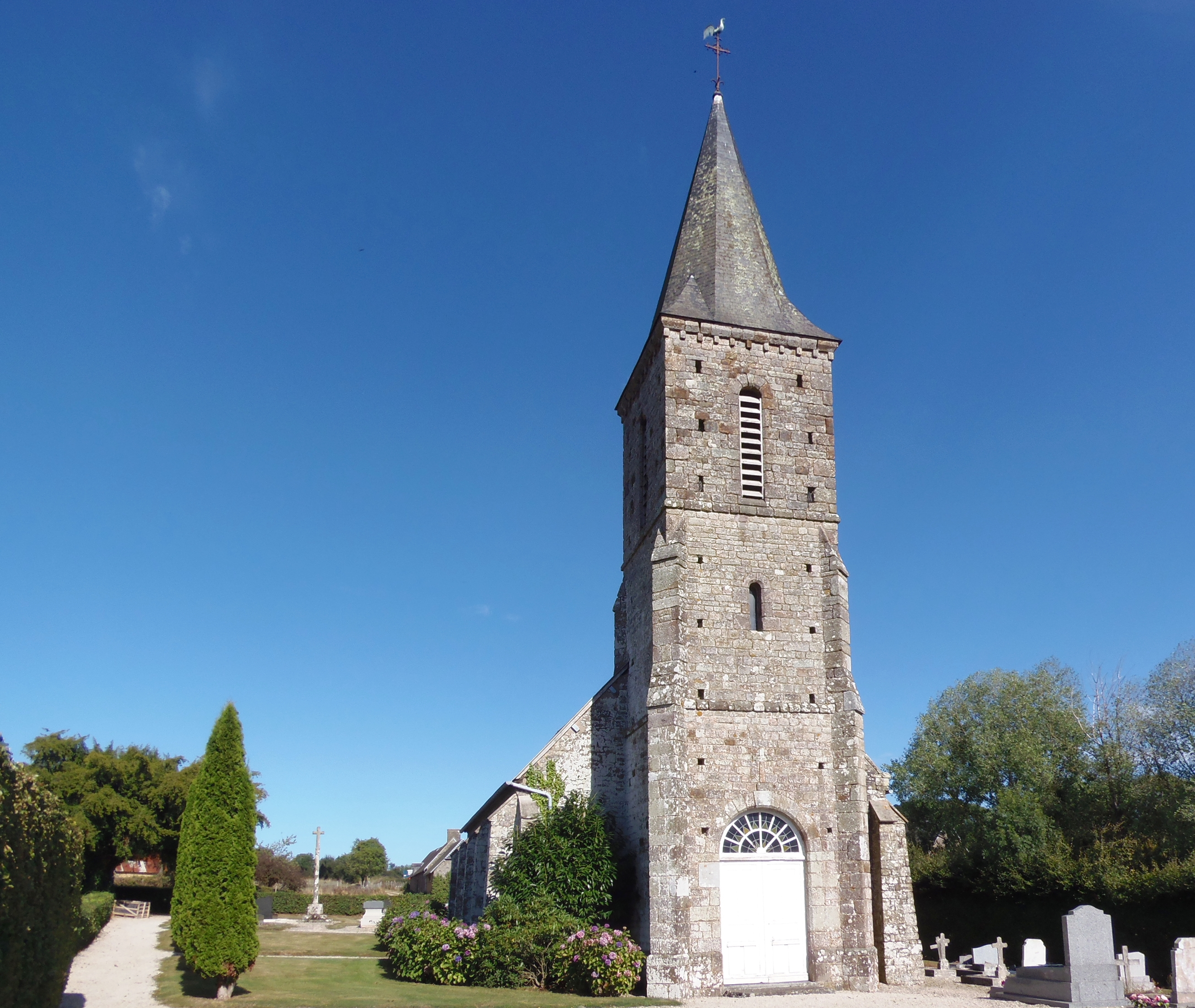 Fourneaux (Normandie, France). L'église Saint-Jean-Baptiste.